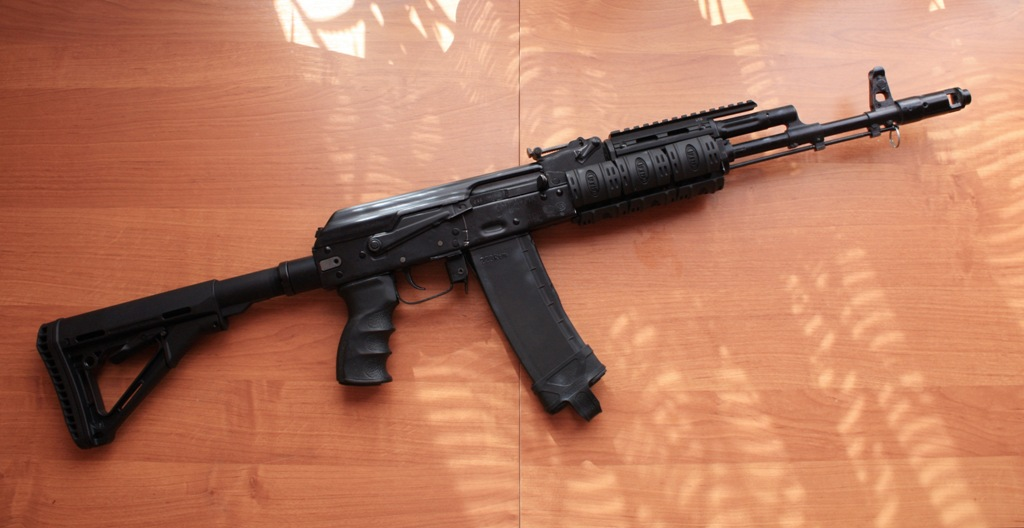 Нарезной охотничий карабин "Сайга Мк .223 Rem"